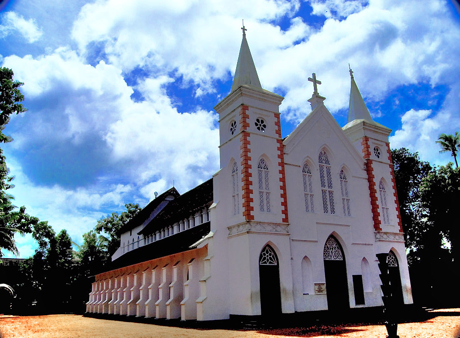 നിരണം പള്ളി